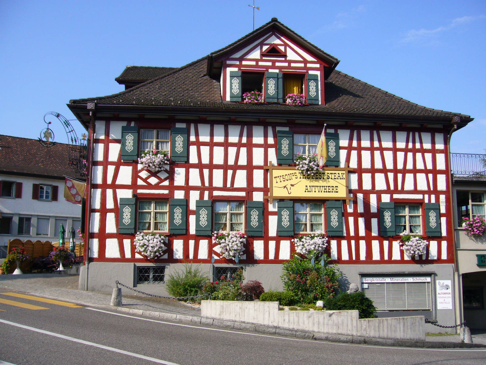 Pilgergasthaus Engel in Sirnach, Kanton Thurgau. Fotografiert von Peter Berger, 23. Juli 2006.